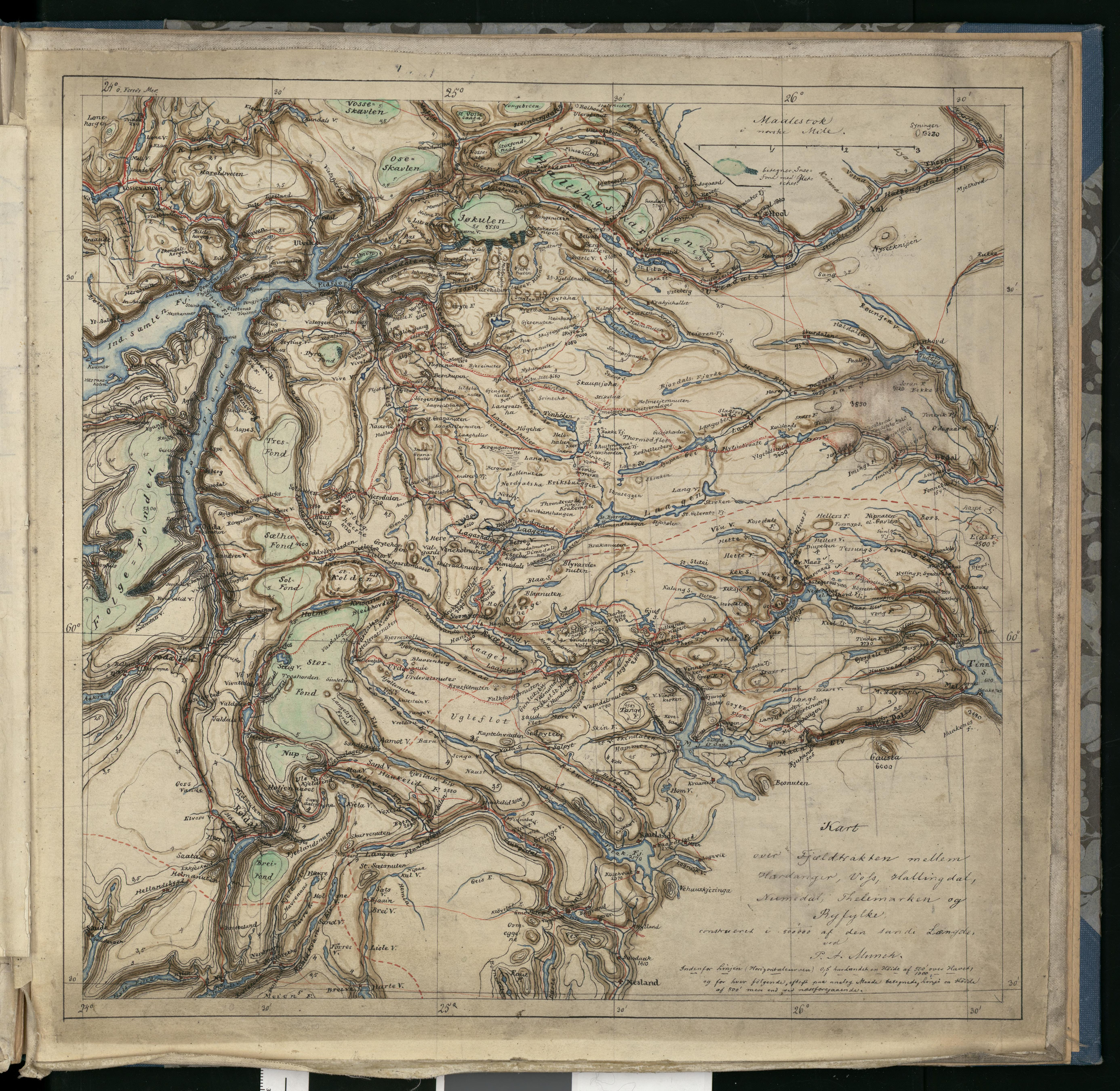 Peter Andreas Munch: «Kart over Fjældstrakten mellem Hardanger, Voss, Hallingdal, Numedal, Thelemarken og Ryfylke». Målestokk 1:500000.